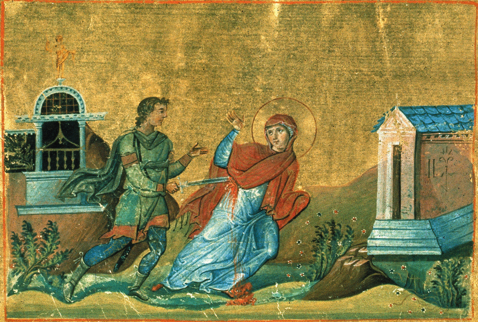 Мученица Анисия Солунская. Миниатюра из Минология Василия II. 976-1025 гг. (Vat. gr. 1613. P. 337)